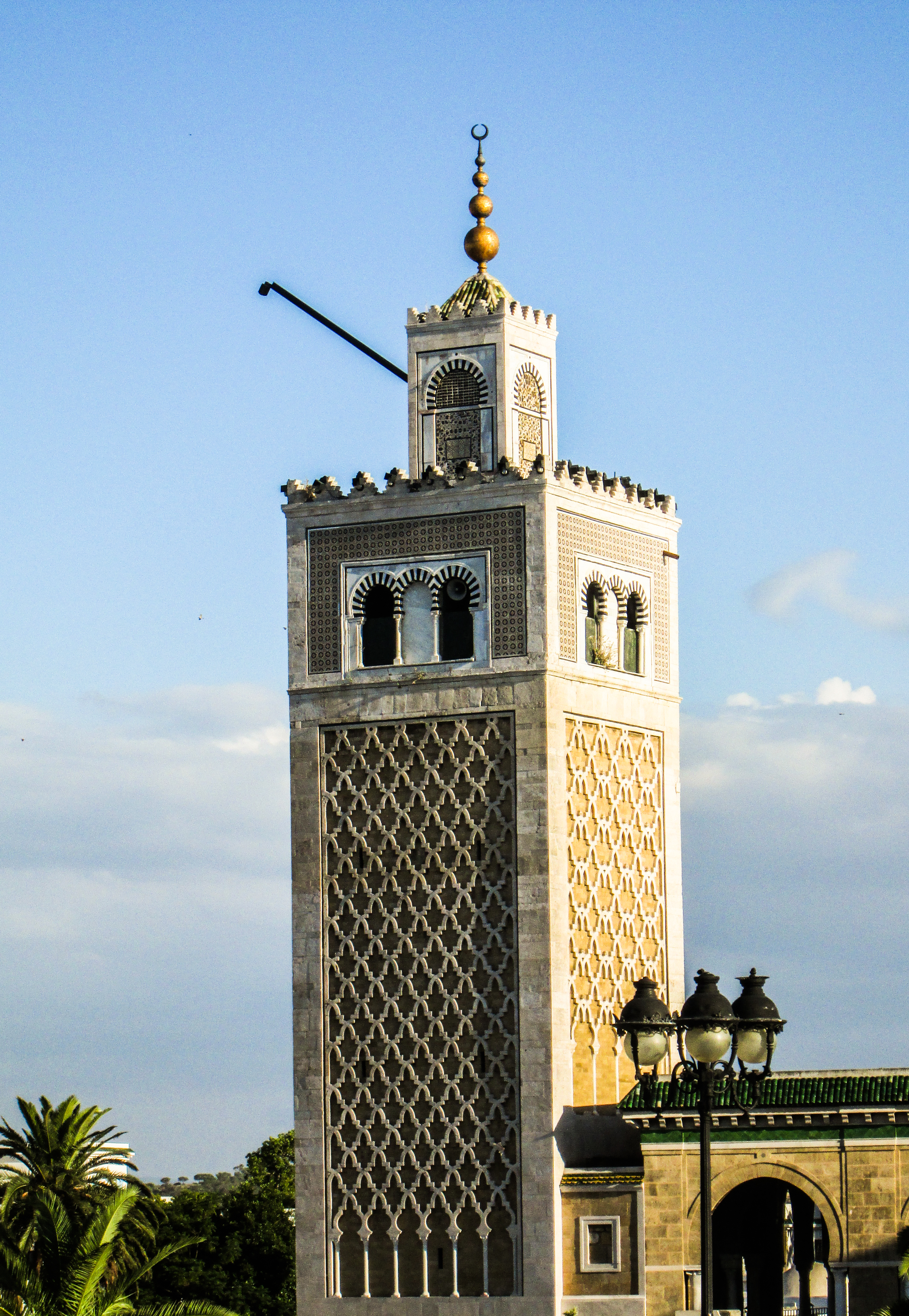 Mosquée de la Casba, Tunis